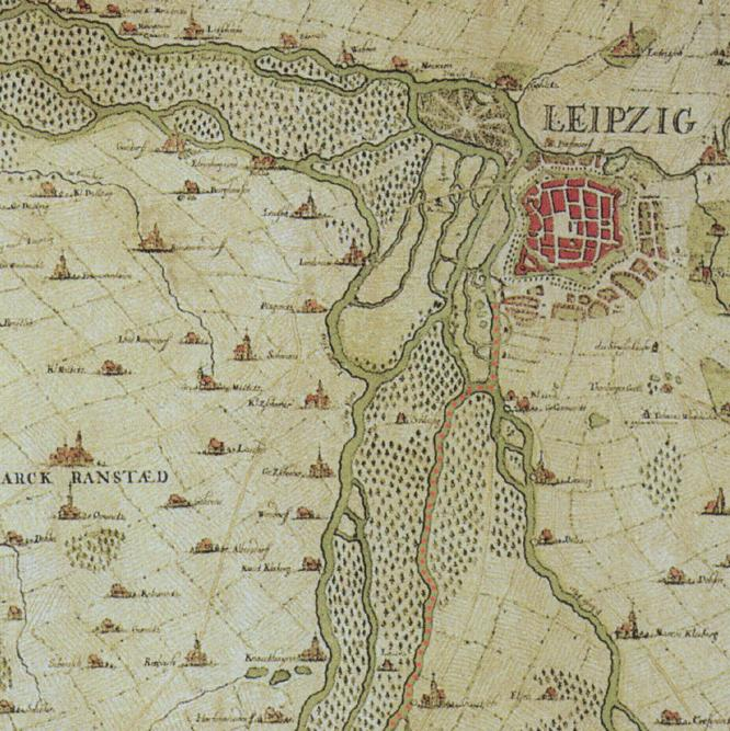 Zum Verlauf des Elsterfloßgrabens. (Ausschnitt aus einem "PLAN derer Gewässer Flüsse so bey Leipzig ab und zu lauffen" von 1748) Floßgräben nachträglich rot gepunktet.